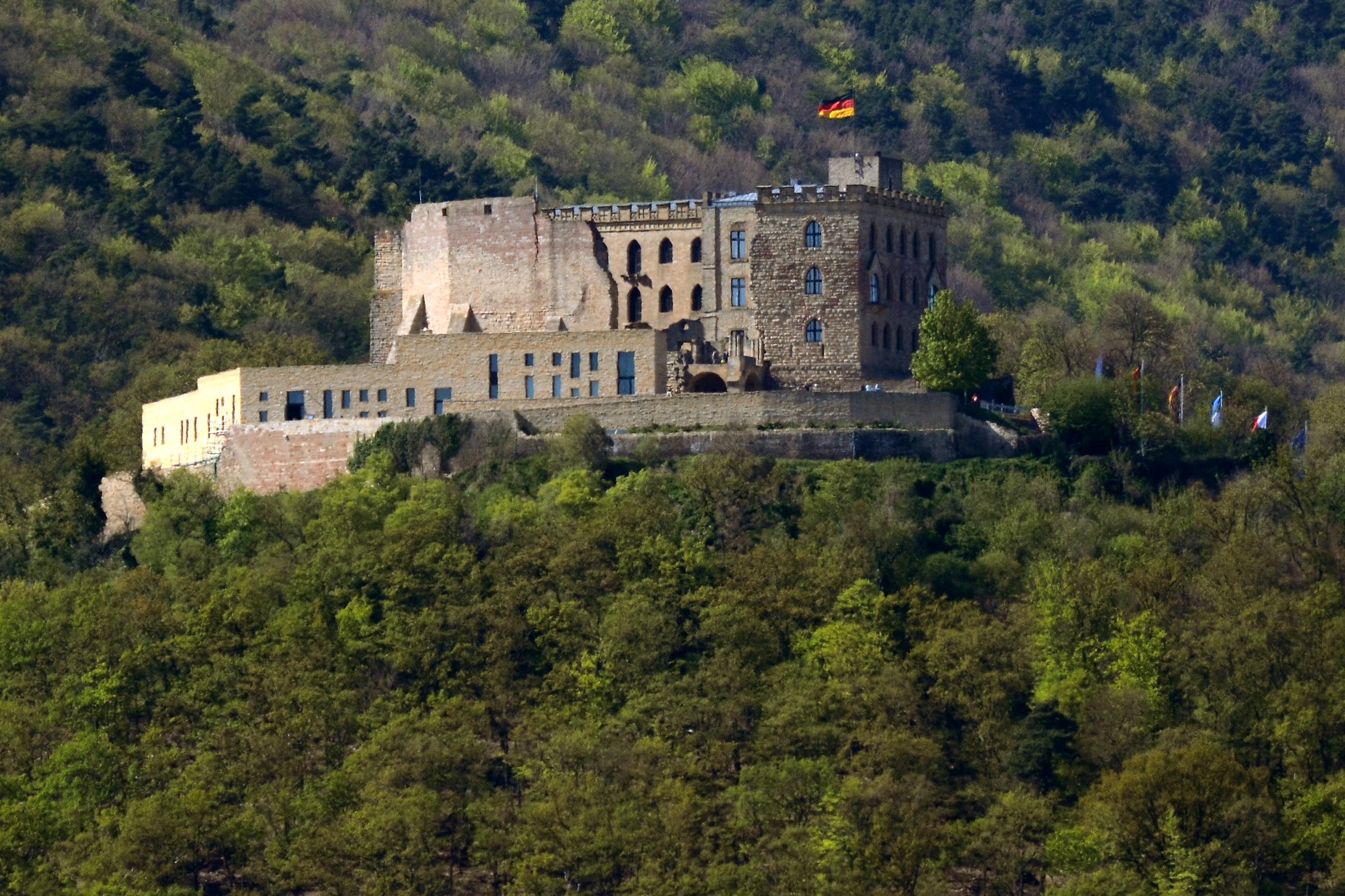 Hambacher Schloss